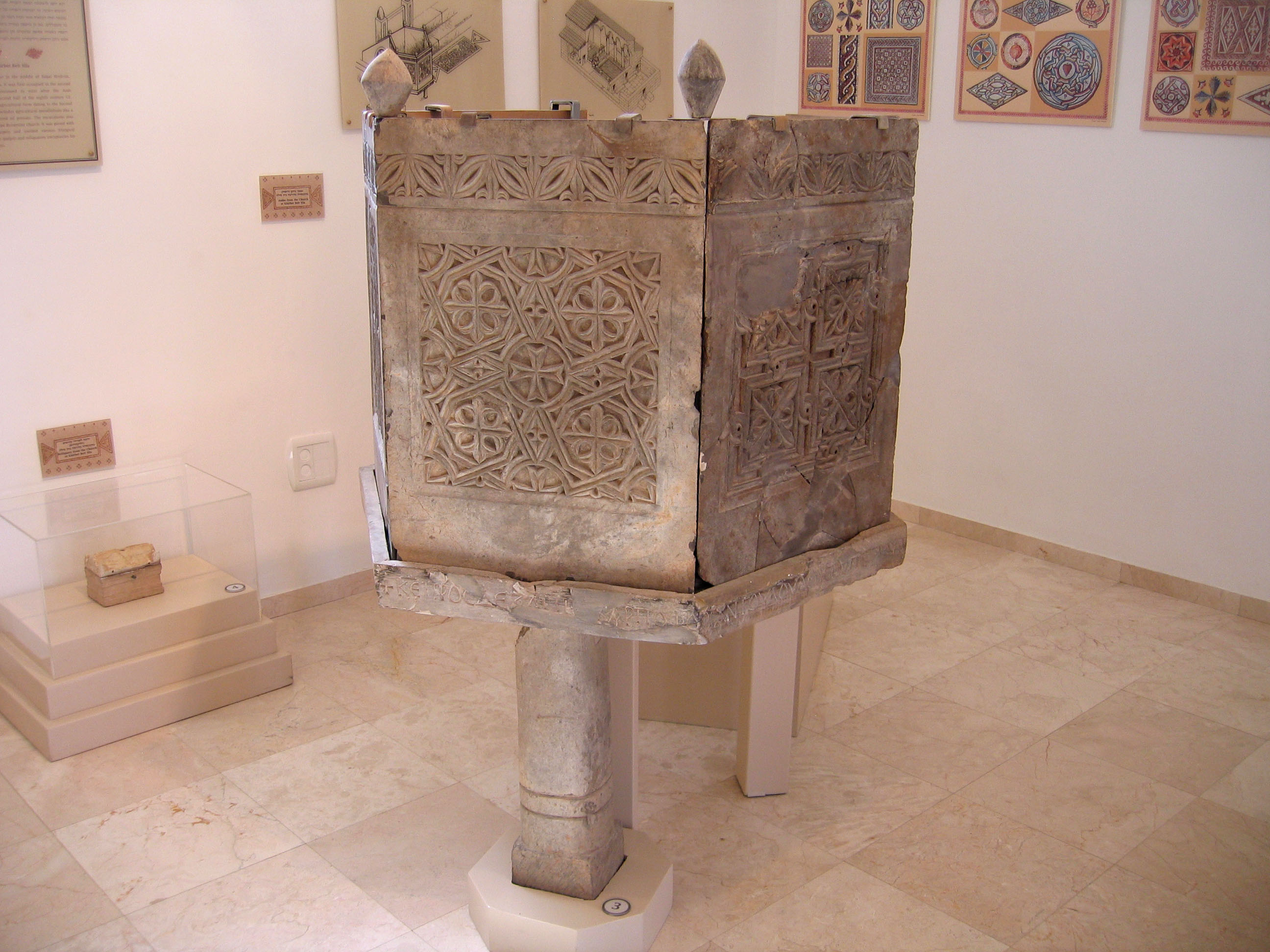 דוכן דרשה, הכנסייה בח'רבת בית סילה